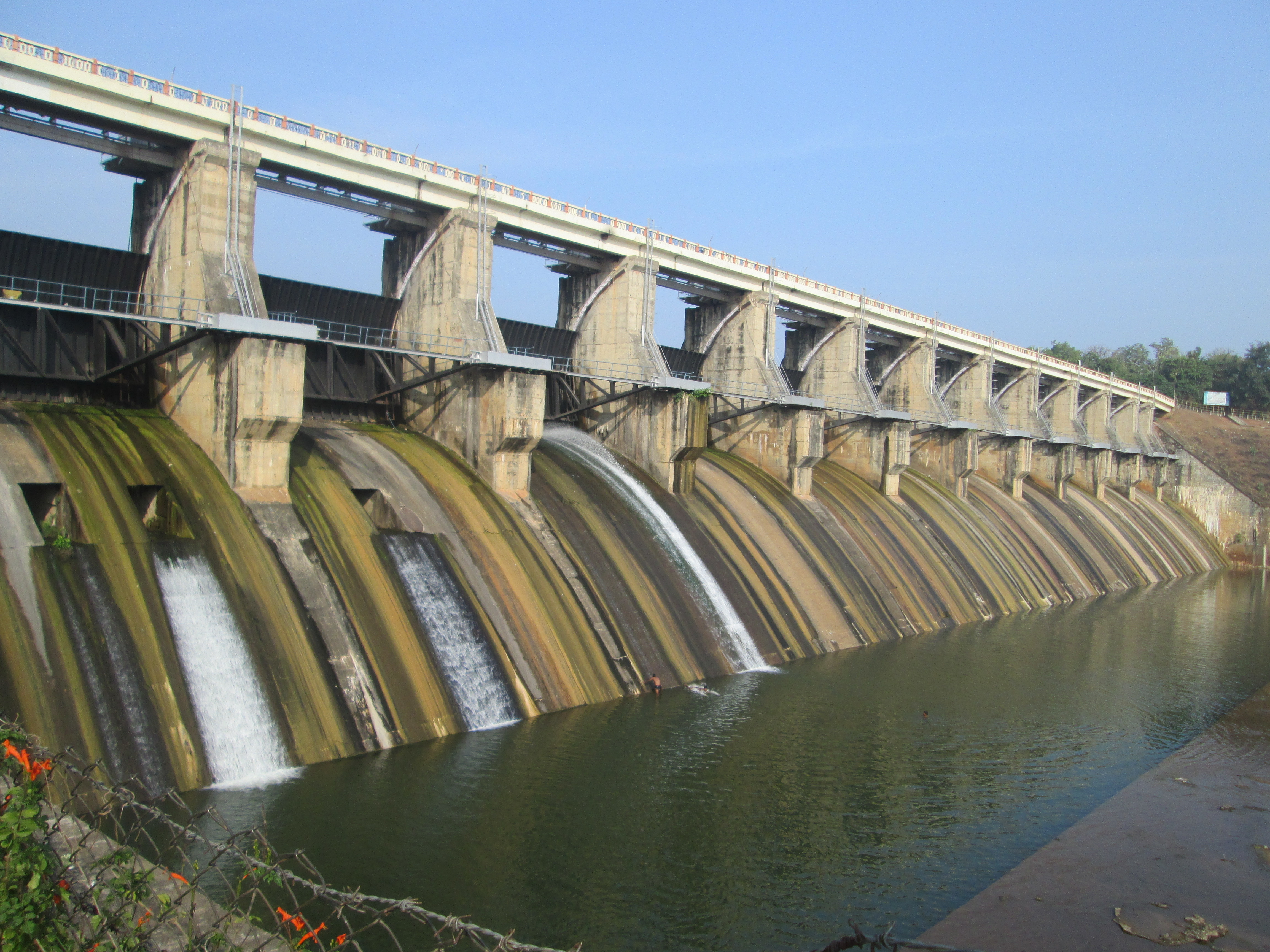 కిన్నెరసాని డ్యాం